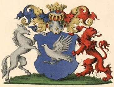 Bibikovi suguvõsa aadlivapp